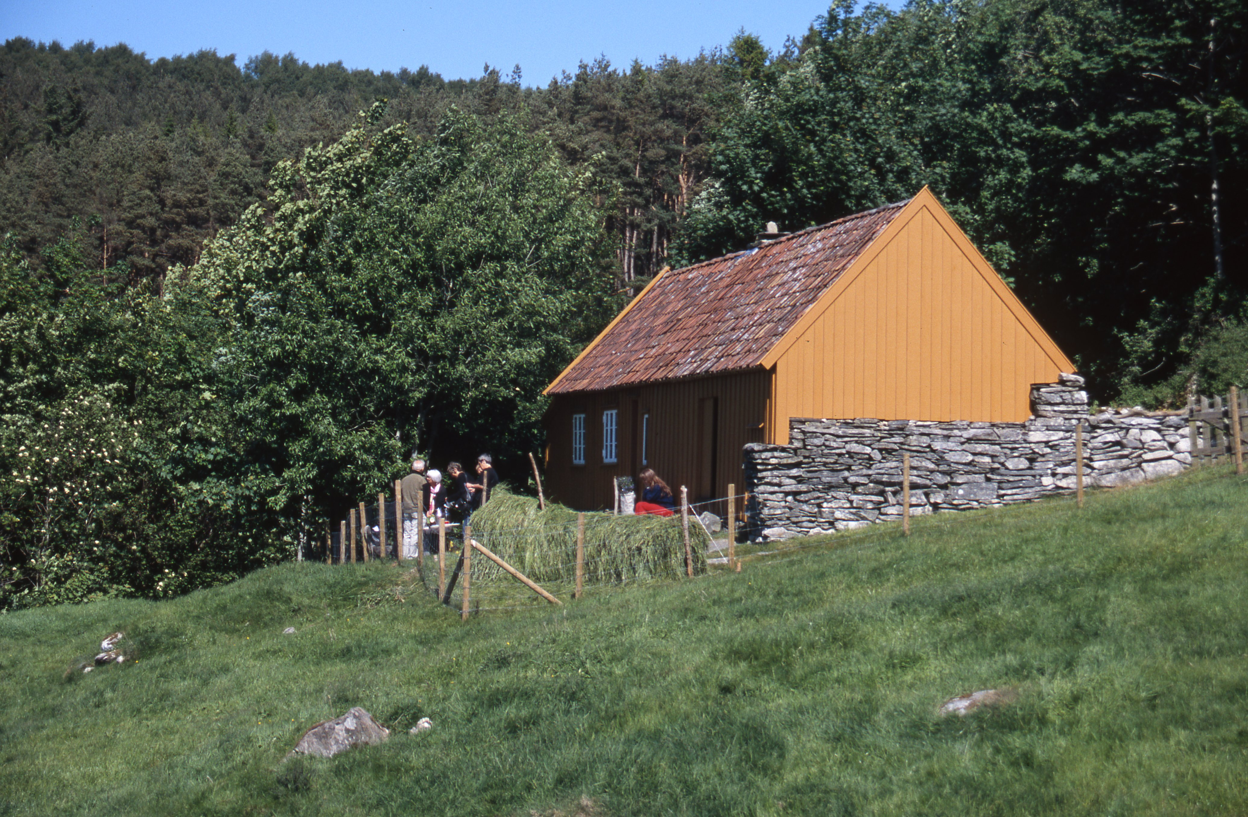 Husmannsplassen Bakken på Rennesøy er ei avdeling av Ryfylkemuseet.